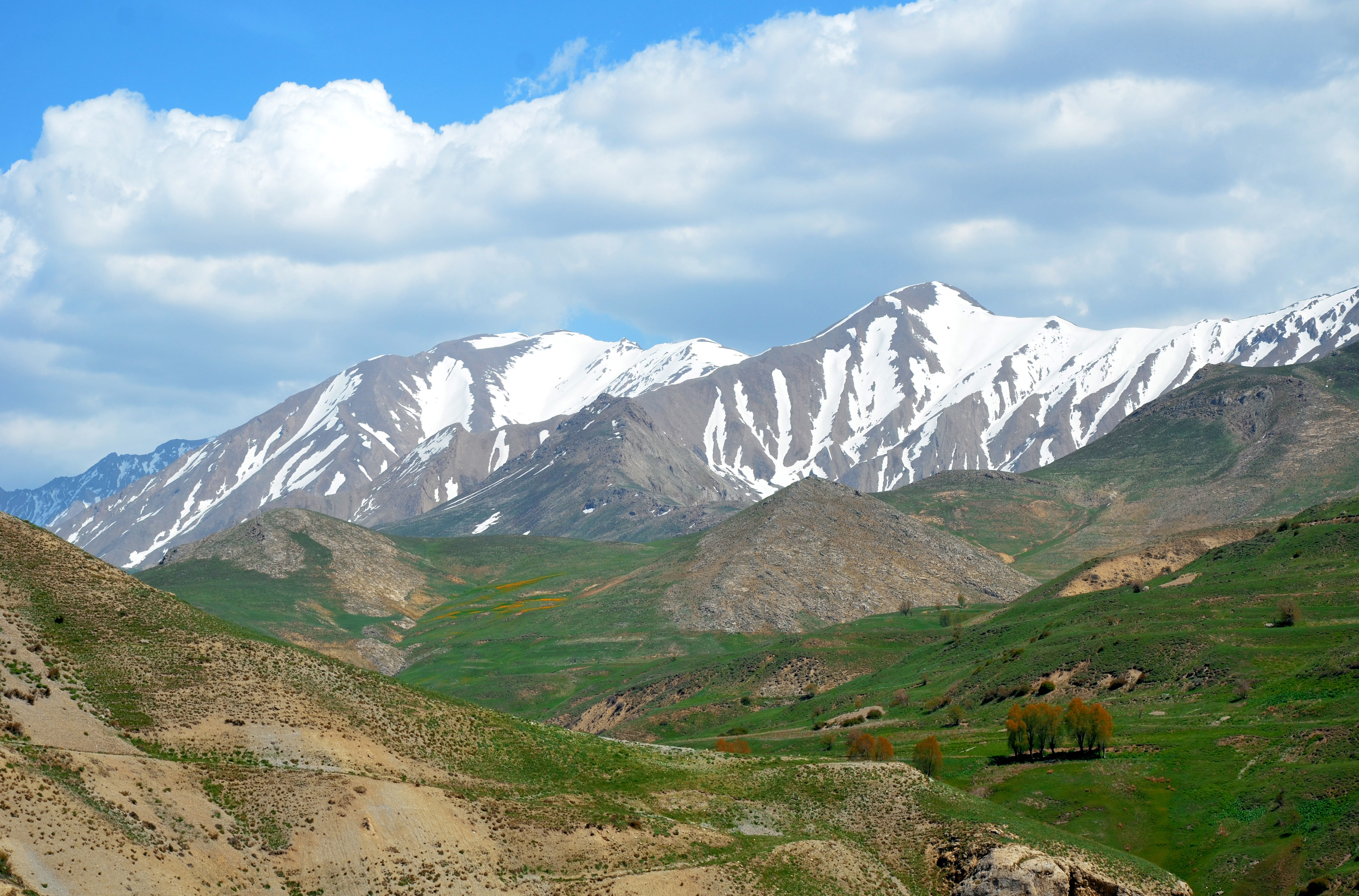 Haraz - Lasem road